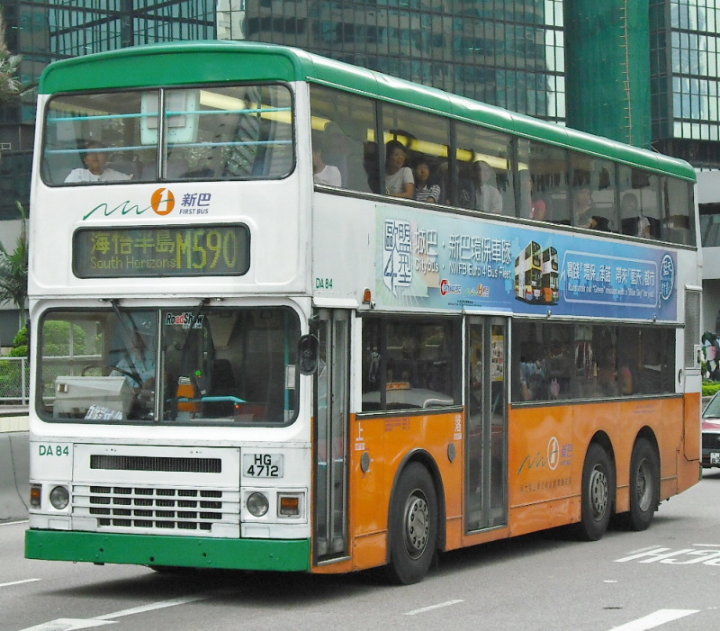 中文（香港）: 新巴M590線，攝於中環怡和大廈附近的巴士站。